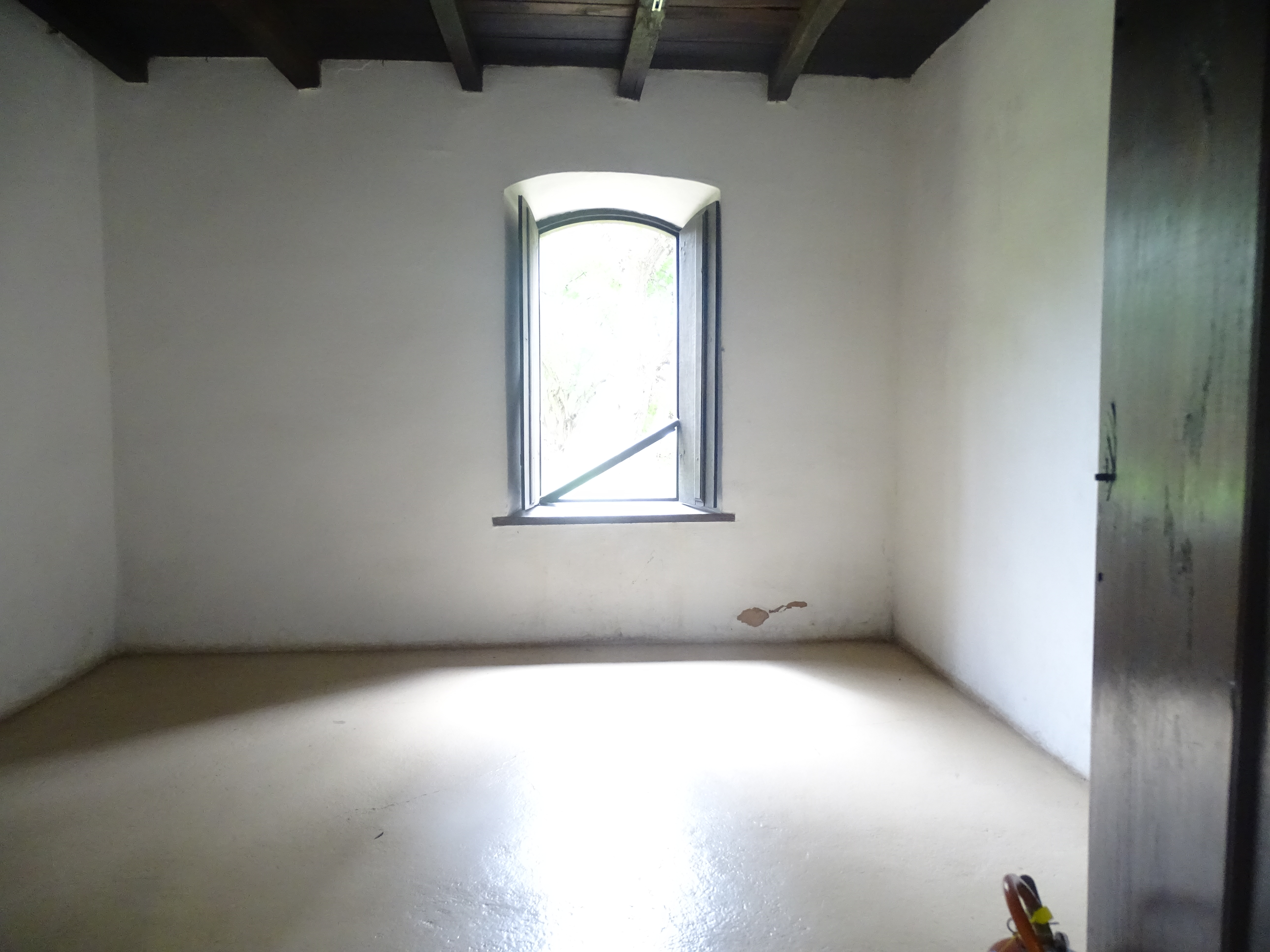 Os quartos abrigavam diversas pessoas, não havendo um certo quarto para cada pessoa. As pessoas dormiam neles em redes.